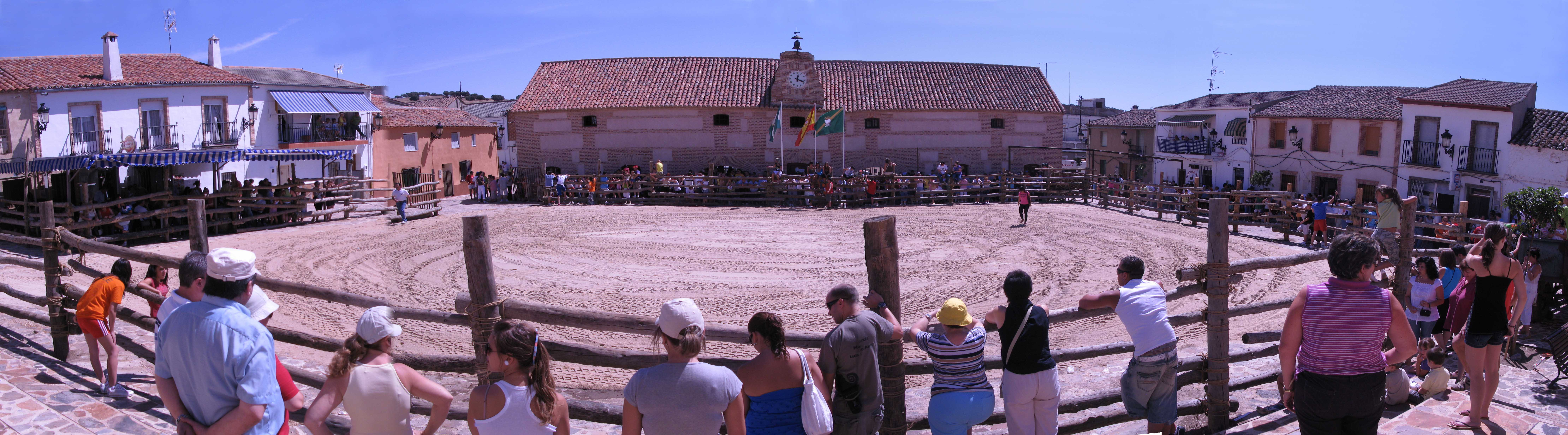 Plaza de Aldeaquemada en las fiestas de San Miguel